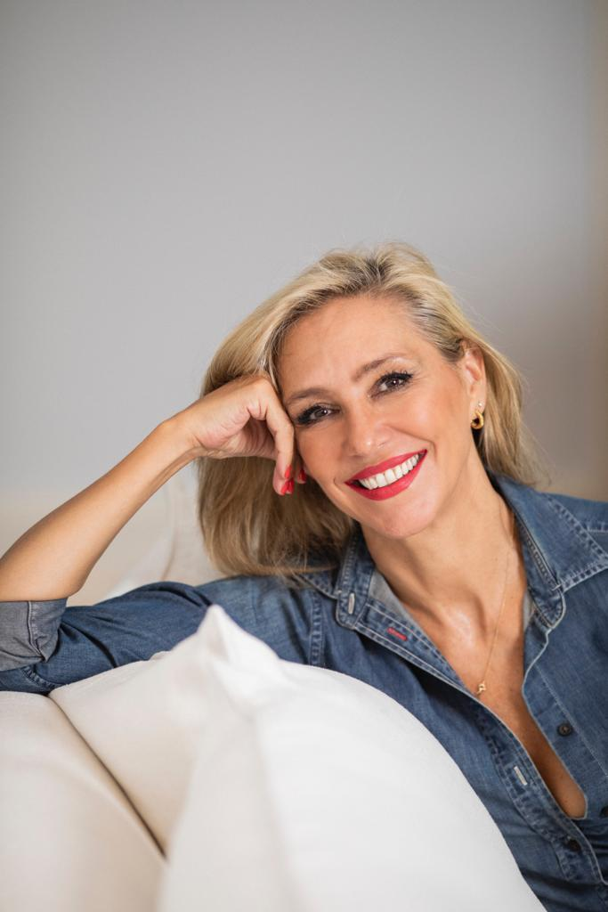 Marta Robles, periodista y escritora